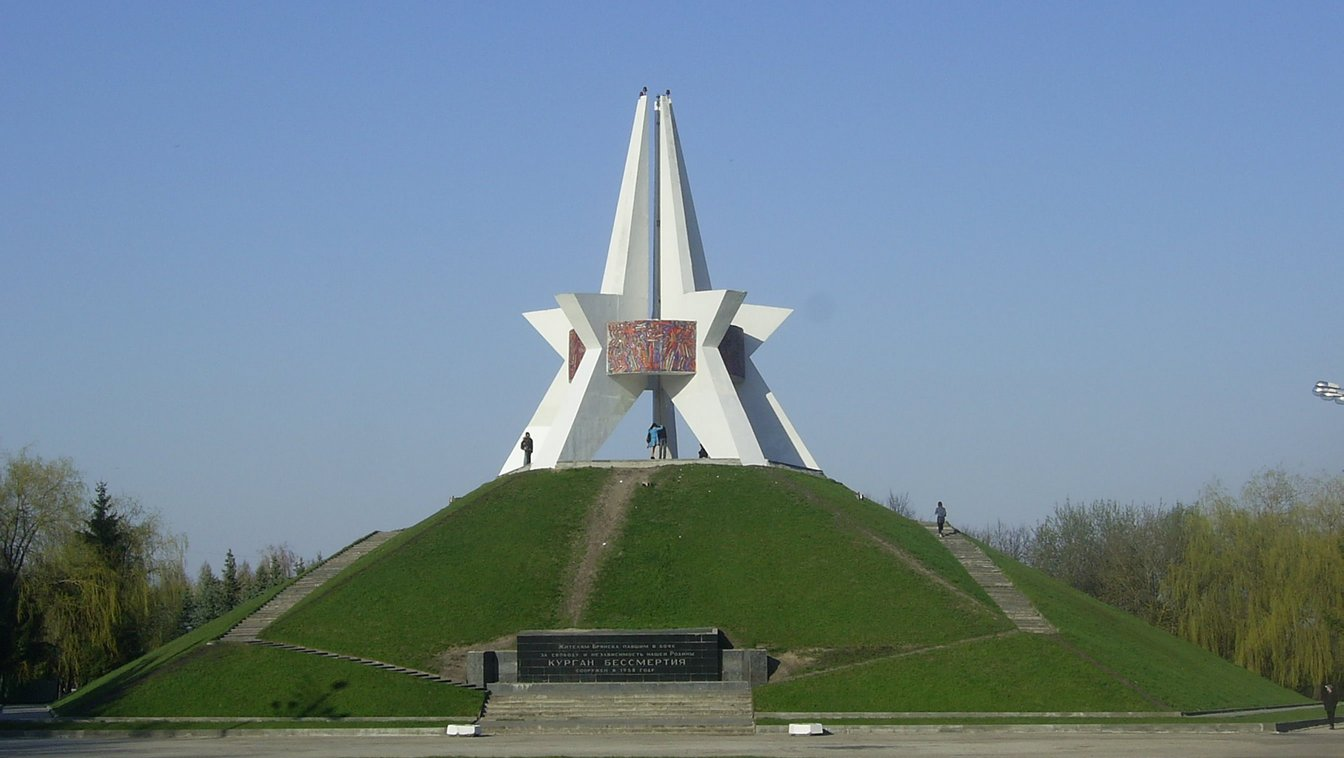 Курган Бессмертия в Брянске